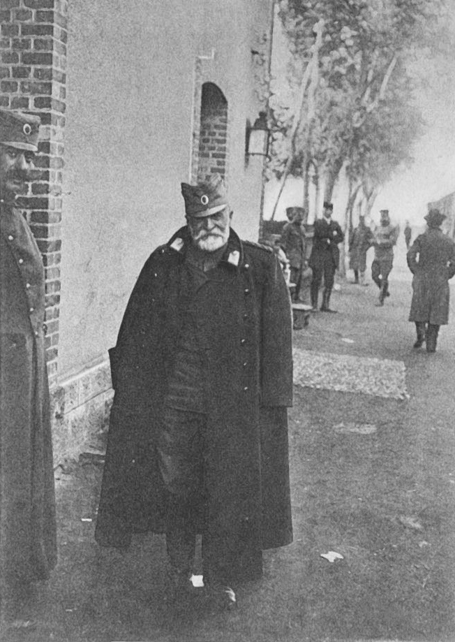 Генерал Радомир Путник на гарата в Куманово, 1912